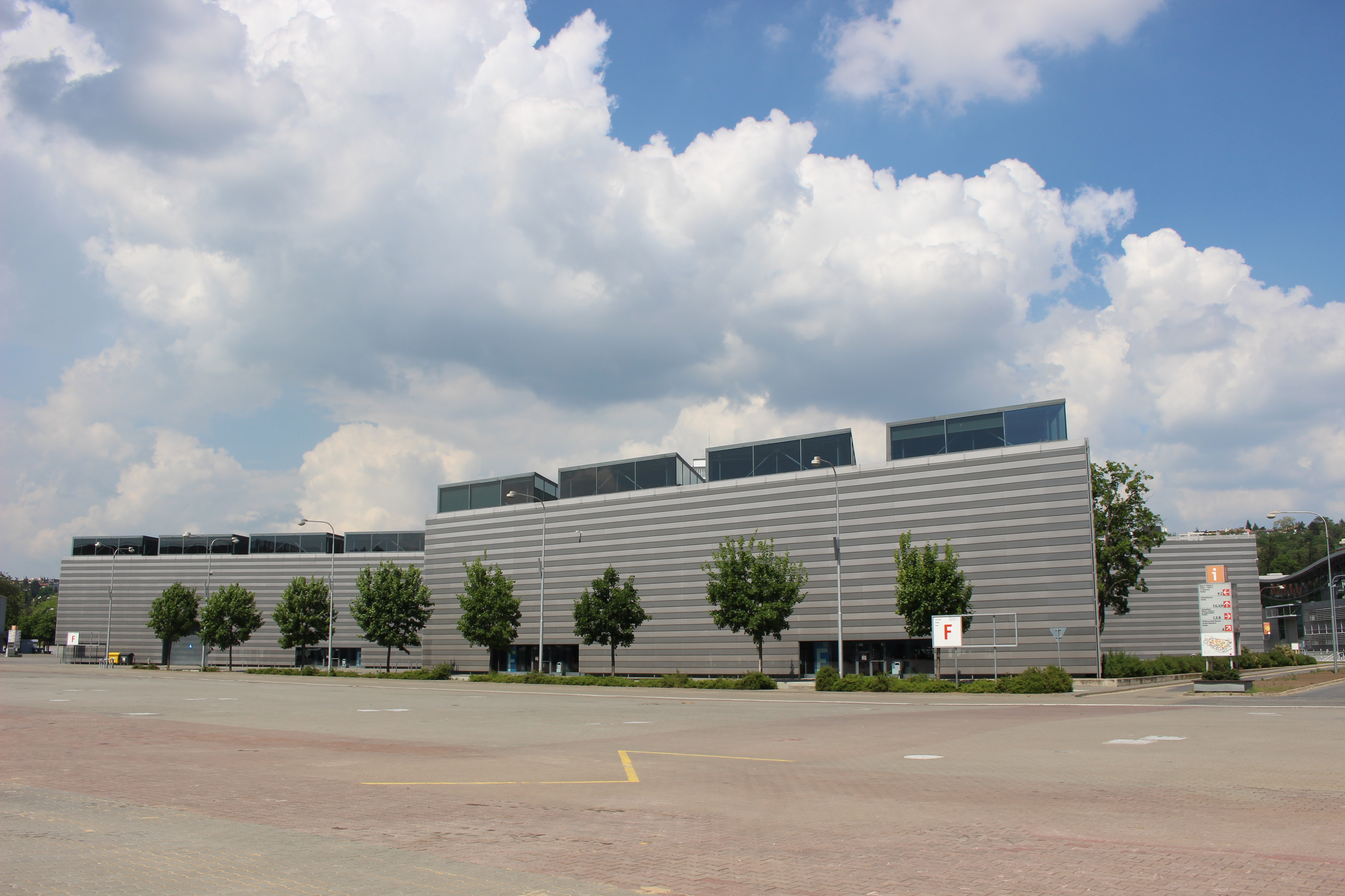 Pavilon F, Brněnské výstaviště